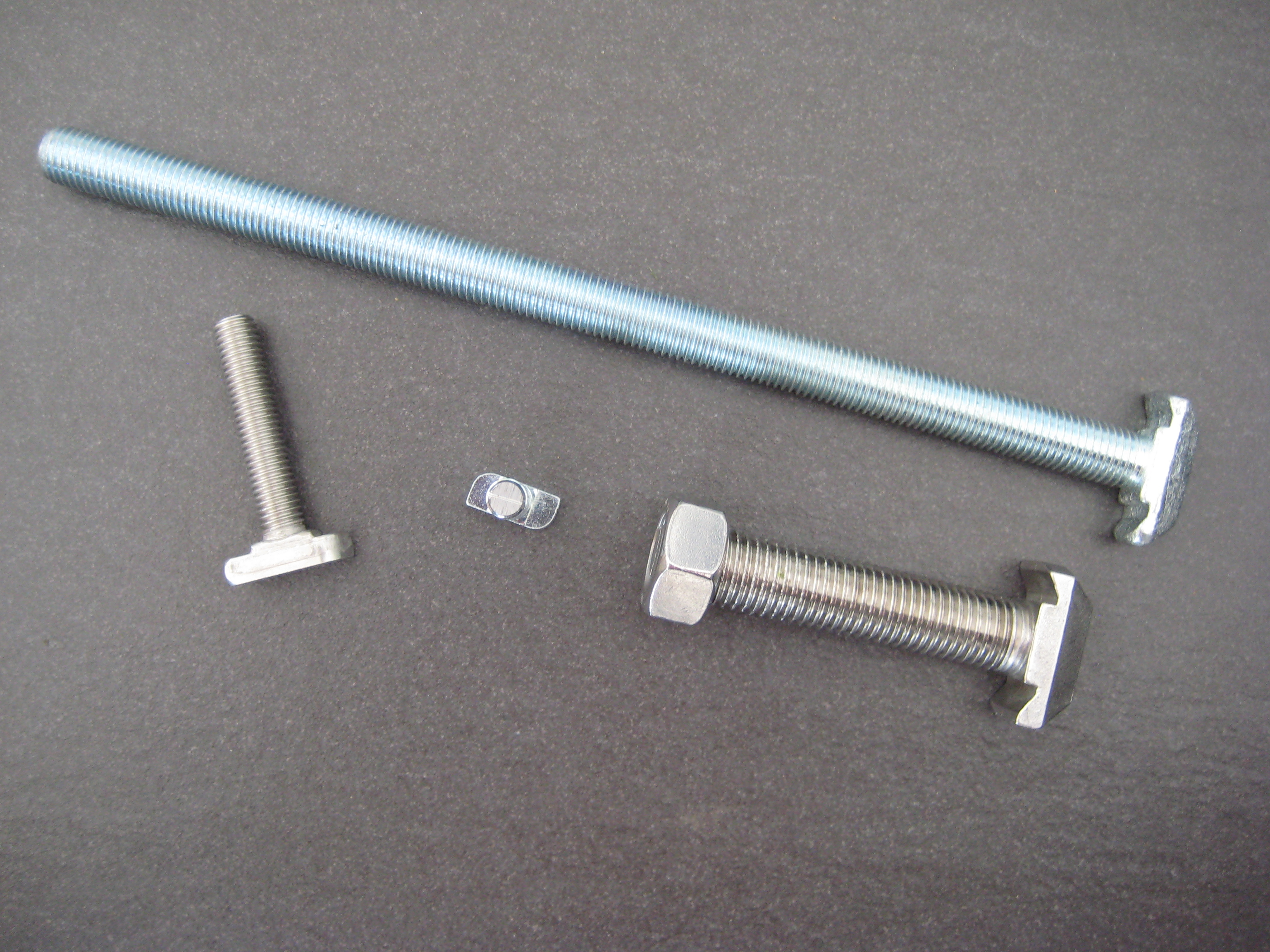 Hammer- /Hakenkopfschrauben